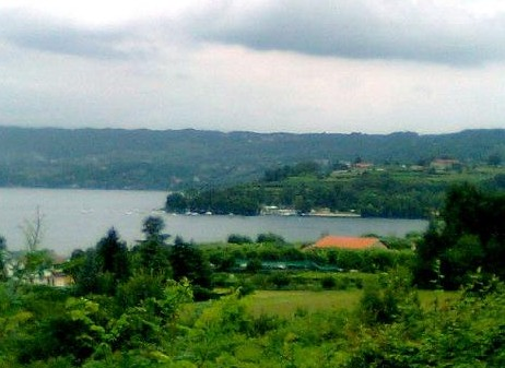 vista generica di Viverone e il Lago omonimo dal lato di Punta Becco arrivando dalla provinciale di Alice Castello